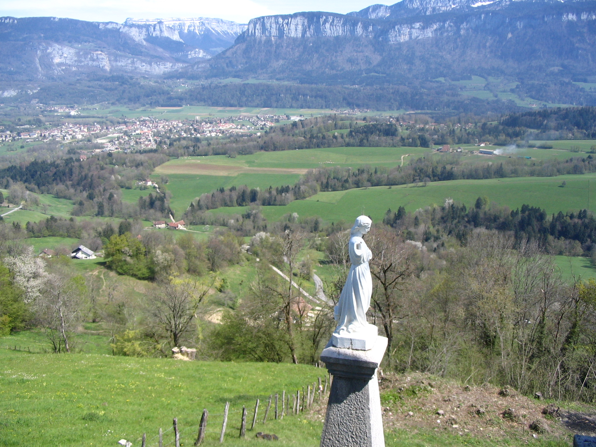 Miribel-les-Échelles - Notre-Dame du Château - Isère - France